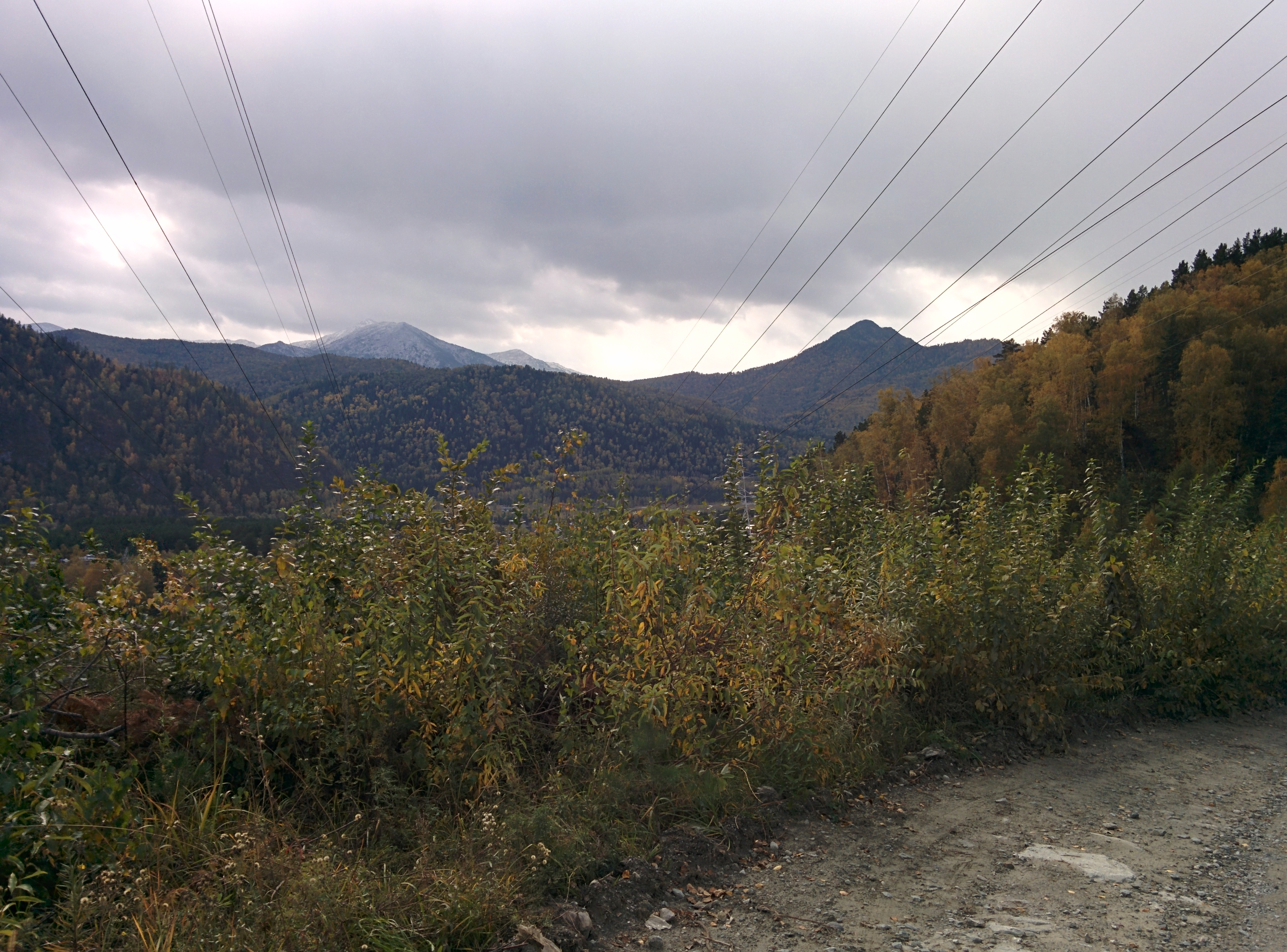 Вид на Борус со стороны пос. Черемушки